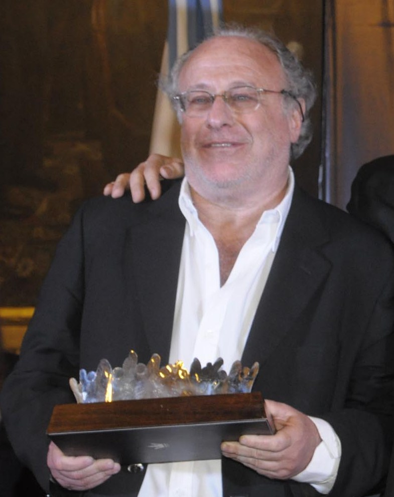 El periodista Mario Wainfeld recibe el premio Democracia en el "Salón de los Pasos Perdidos" del Congreso de la Nación. Fotografía tomada el 14 de febrero de 2010.